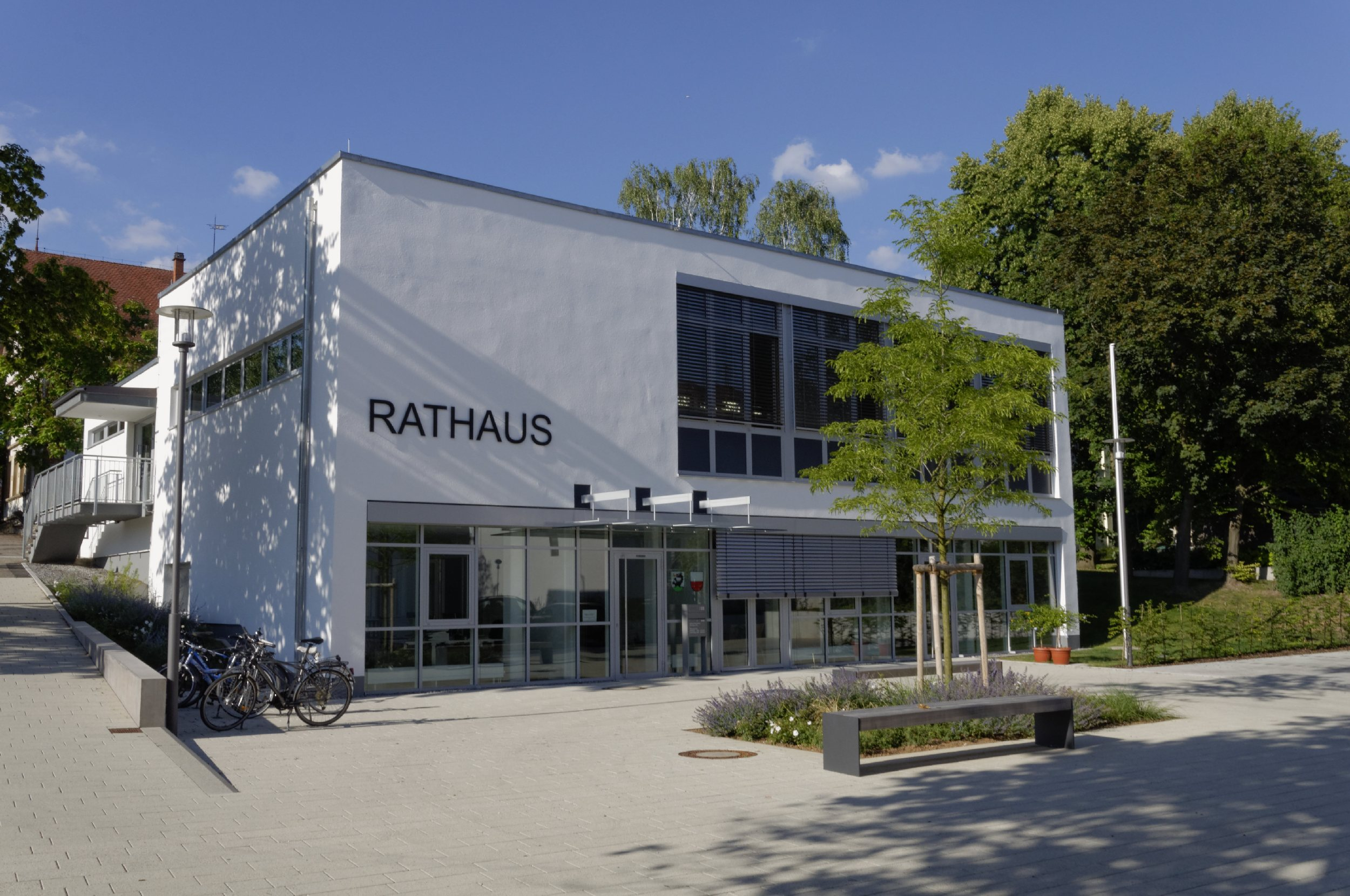 Bilder aus Wurmlingen 2016